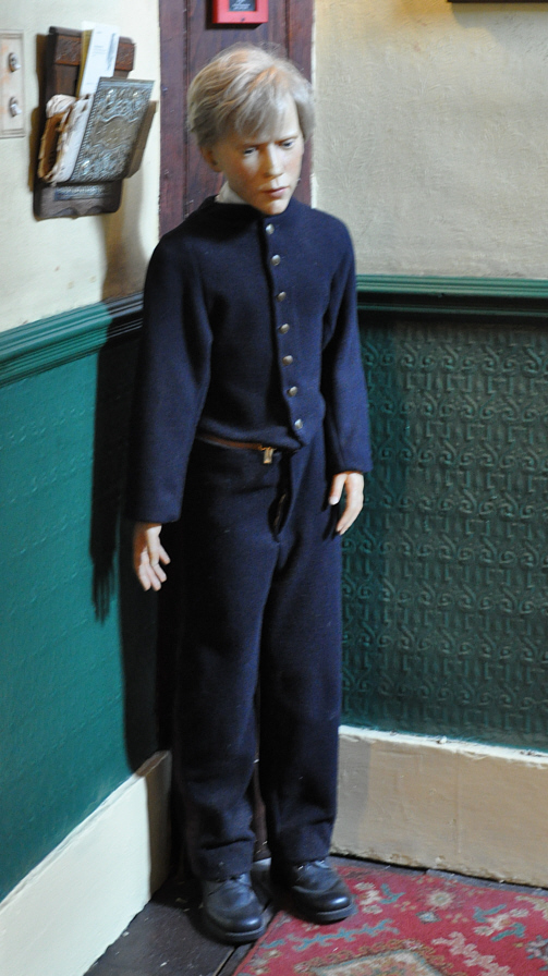 Sherlock Holmes Museum, Baker Street, London Museum figure: Baker Street Irregular (messenger boy)